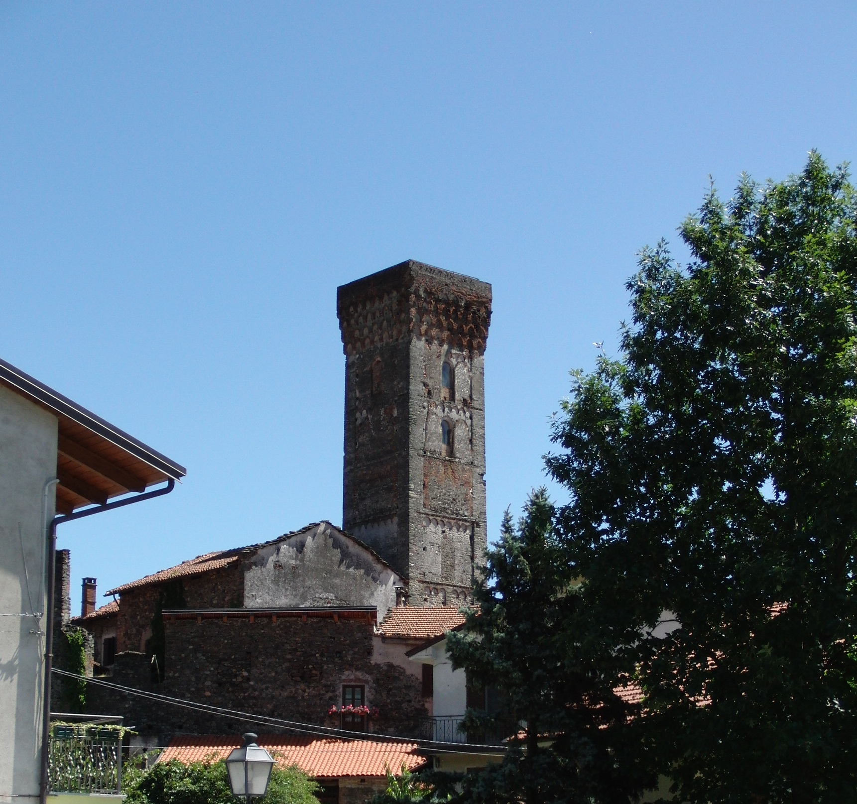 Almese torre del Ricetto di San Mauro di Rivera